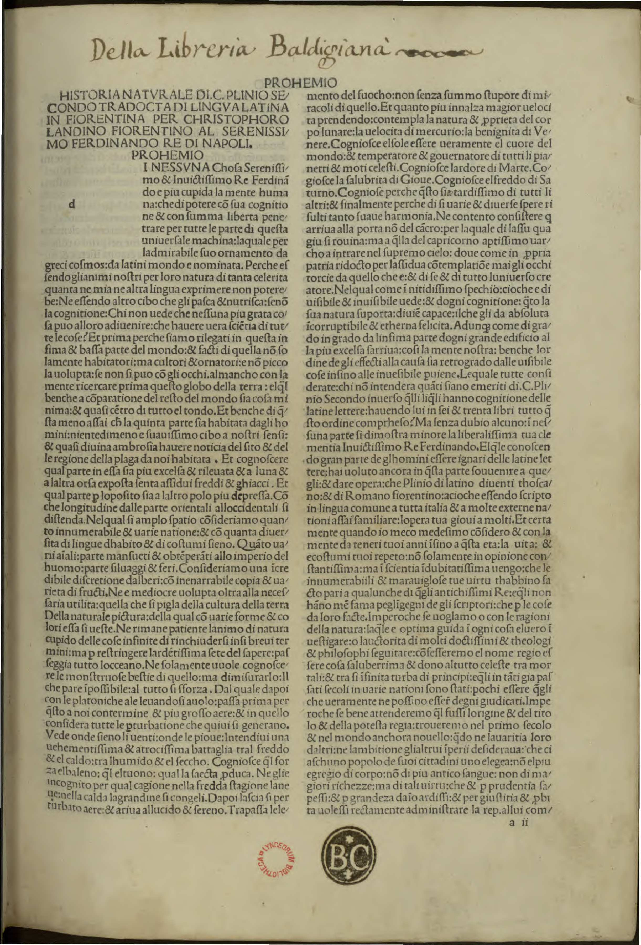 Historia naturalis (italiano). - Impresso in Venesia : per Bartolamio de Zani de Portesio, nellanno della nativita del nostro signore Iesu Christo MCCCCLXXXIX adi XII di septembre. - 260 c. ; a¹², b-q⁸, r-s⁶, A-N⁸, O-P⁶ ; fol. .